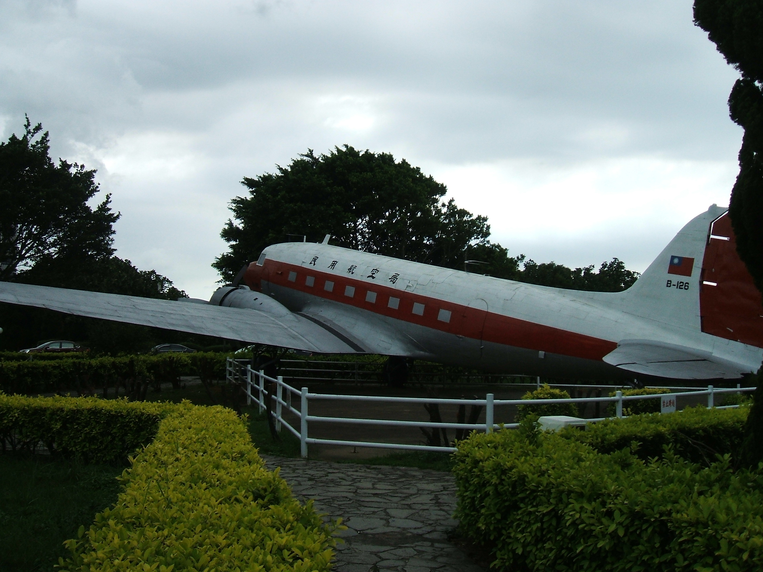 交通部民用航空局飛航查核機DC-3 B-126左後方。